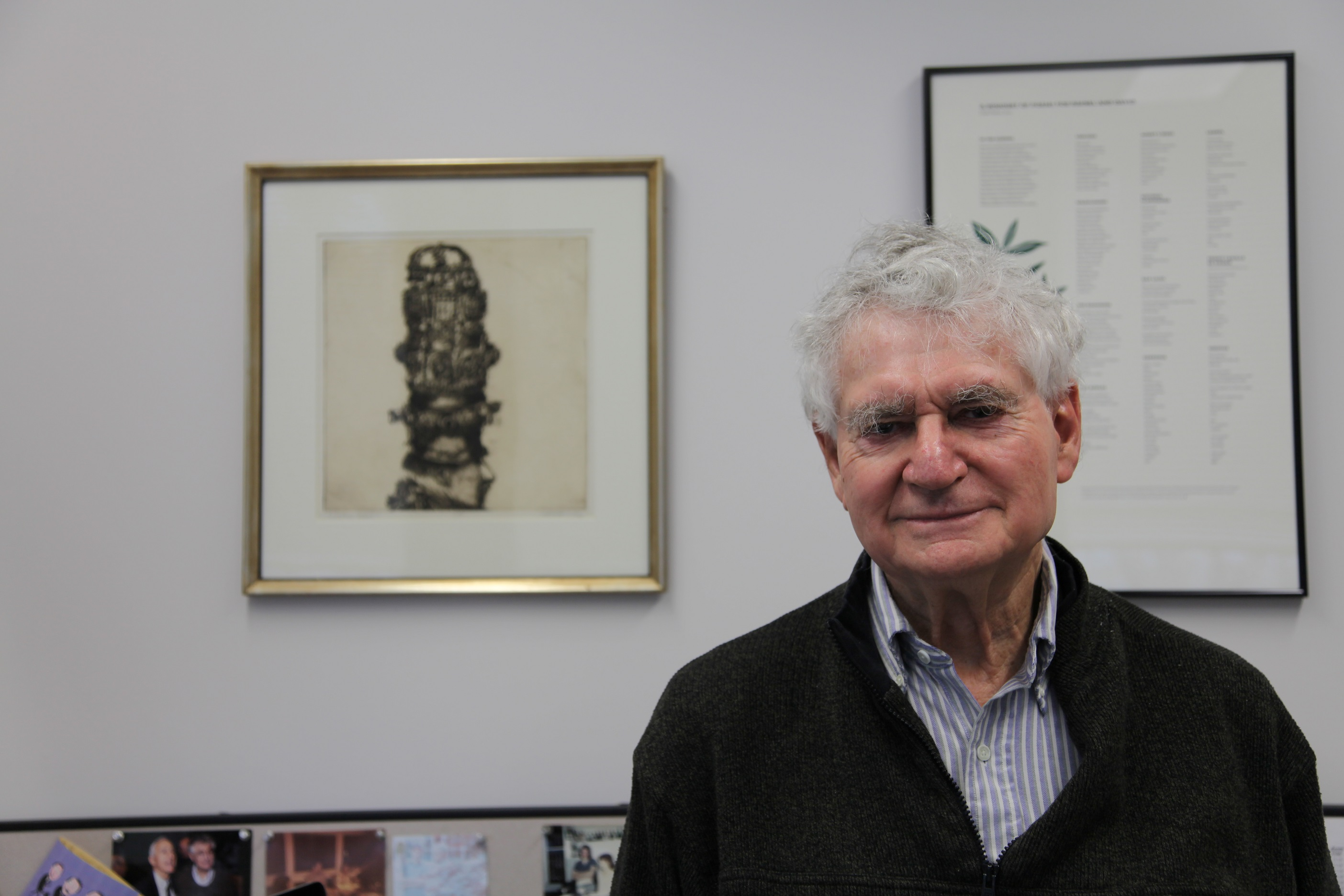 Dr. Ira Pastan